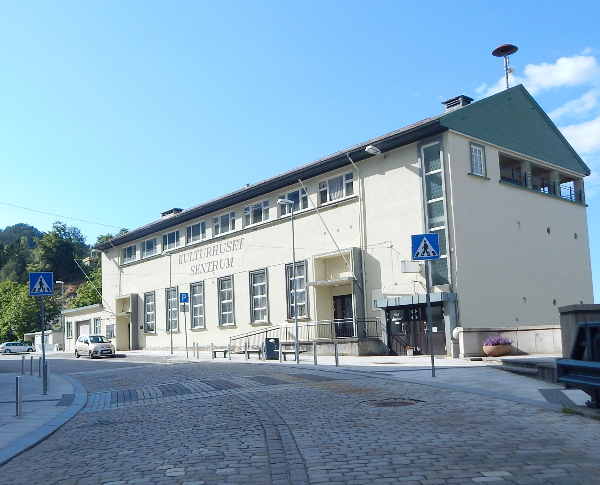 Kulturhuset Sentrum i Ytre Arna, med Peter Jebsens veg (fylkesvei 238) foran